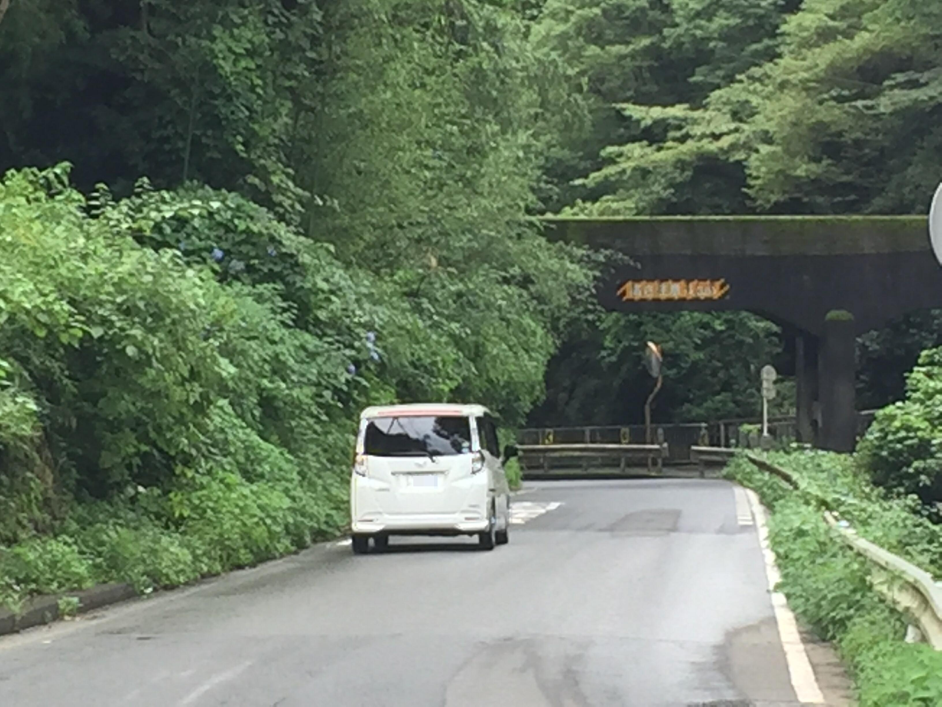 県道510号線・旧道区間（相模原市緑区川尻）。正面は小倉橋方面。横浜水道の水路橋下を通る。